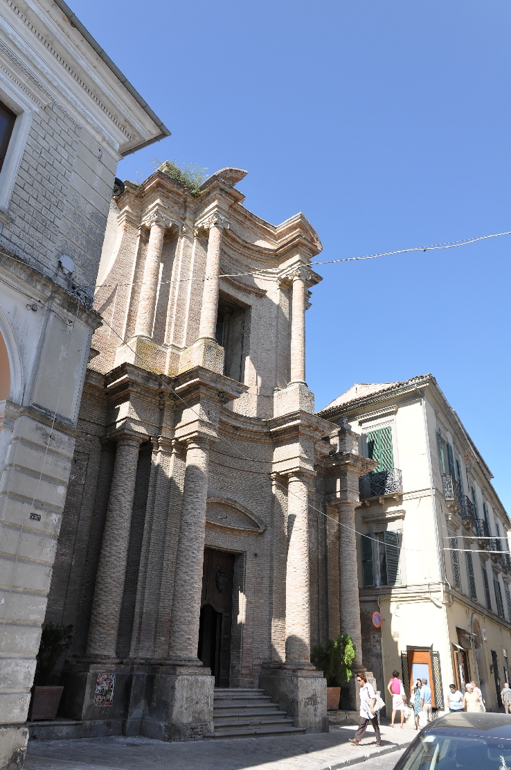 Penne (comune, Italy) 2012